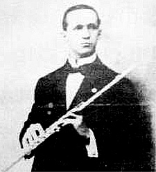 Belmácio Pousa Godinho e sua inseparável flauta.